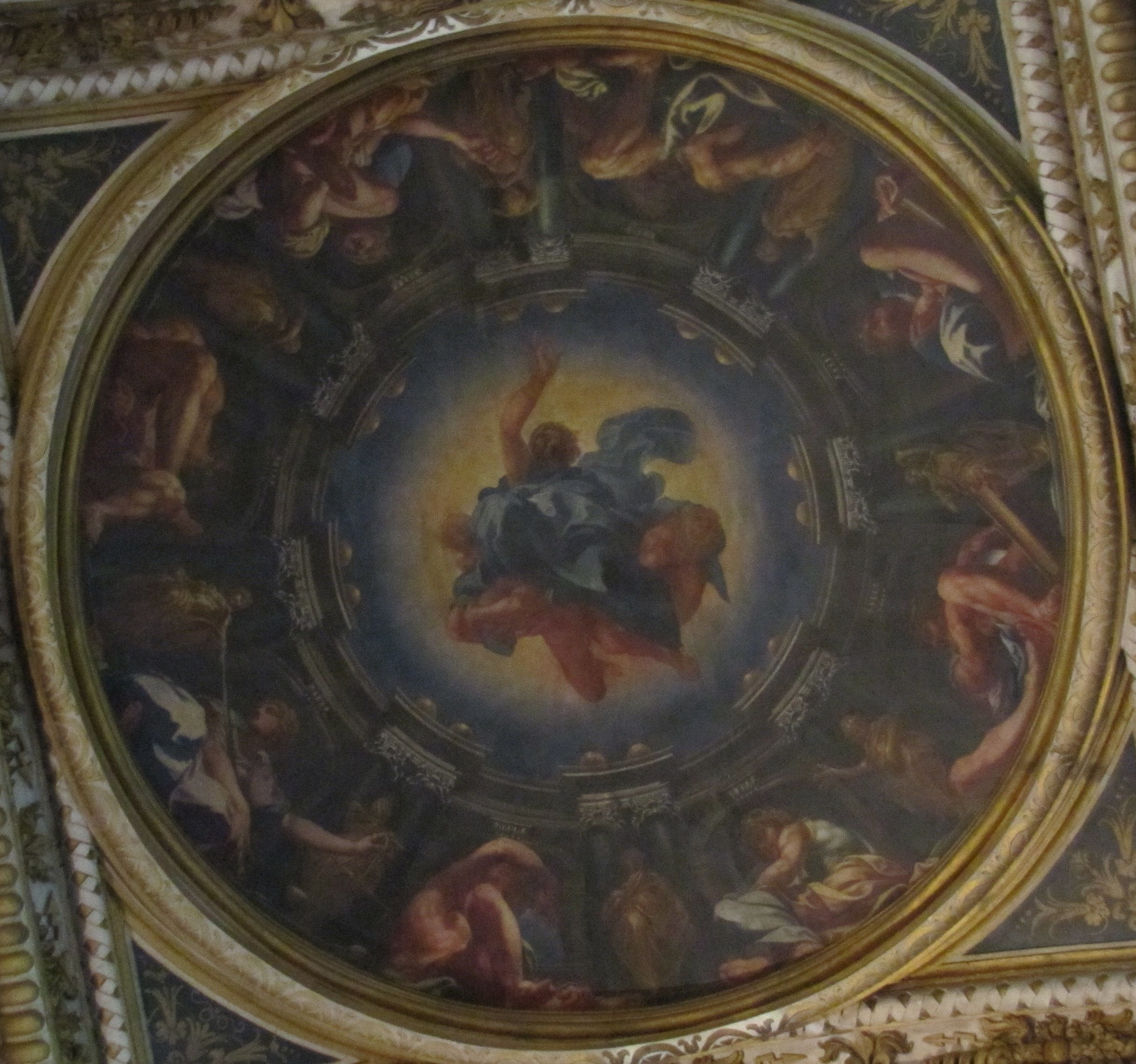 Martin Fréminet, Le Christ entouré des sept premières intelligence et de la Justice, 1608 - 1614, Fontainebleau, musée national du château